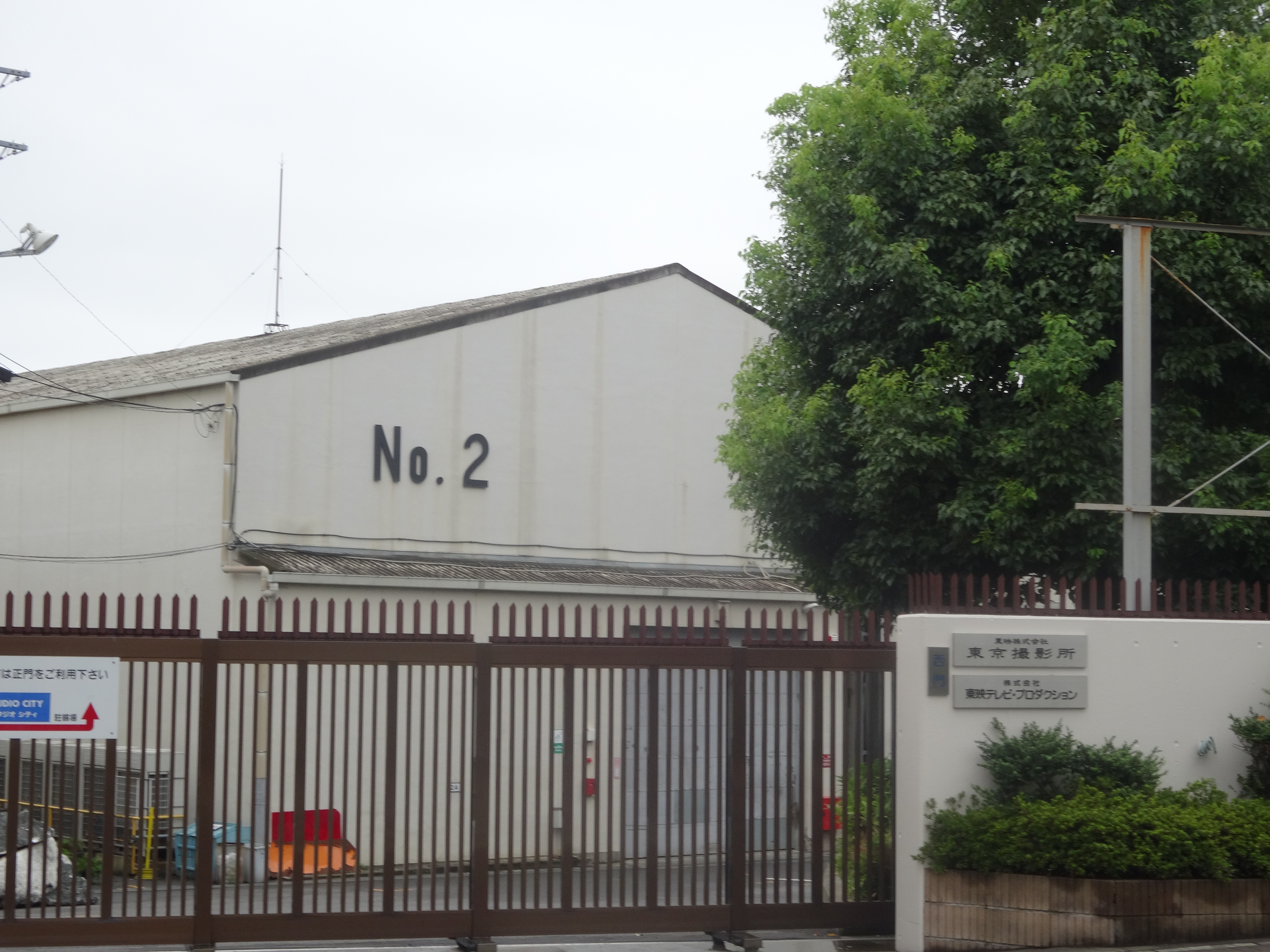 東映東京撮影所の正門。東京都練馬区東大泉に所在。